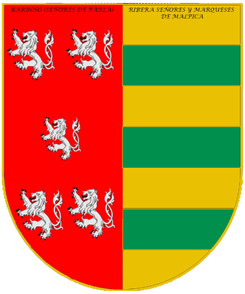 Escudo de los señores de Parla a partir de que ya son también por descendencia señores de Malpica al llevar el apellido Ribera.